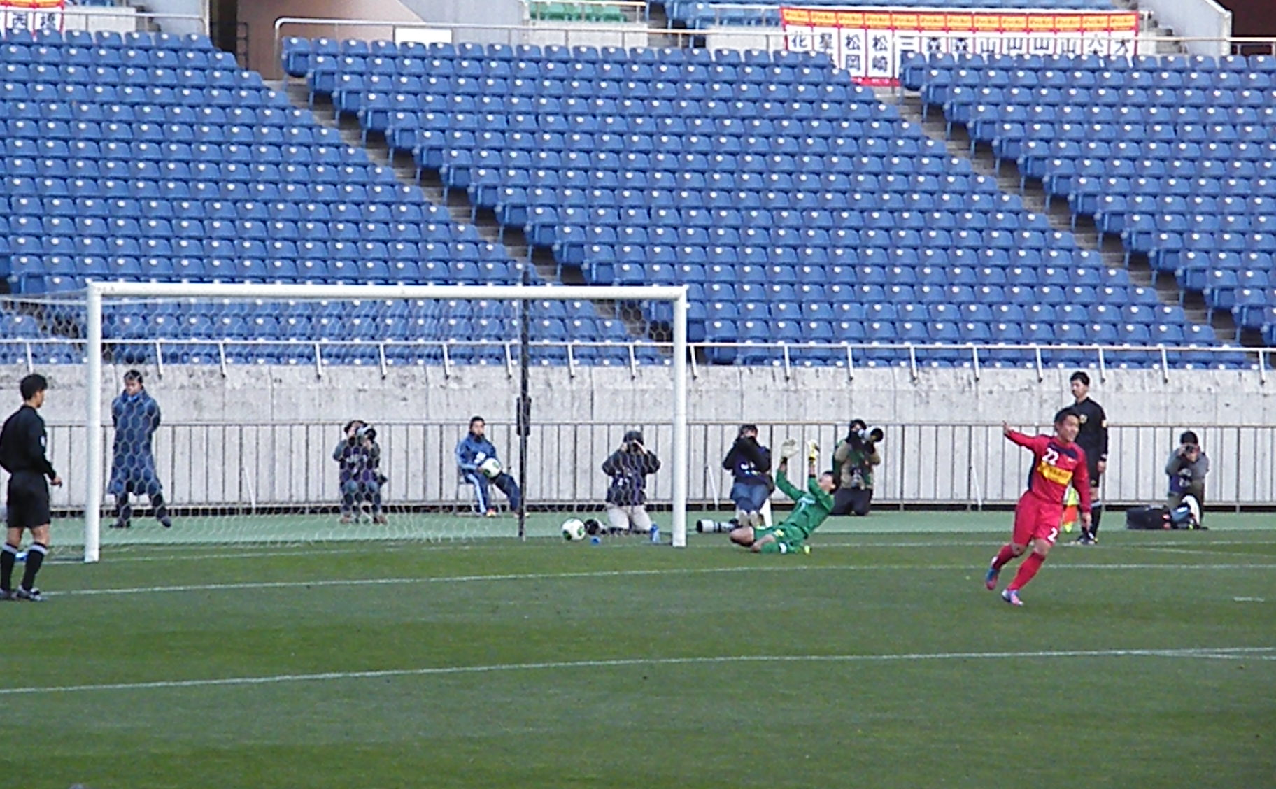 高円宮杯U-18サッカーリーグ2013 チャンピオンシップのPK戦で、流経大柏の石川選手がPKを決めた場面